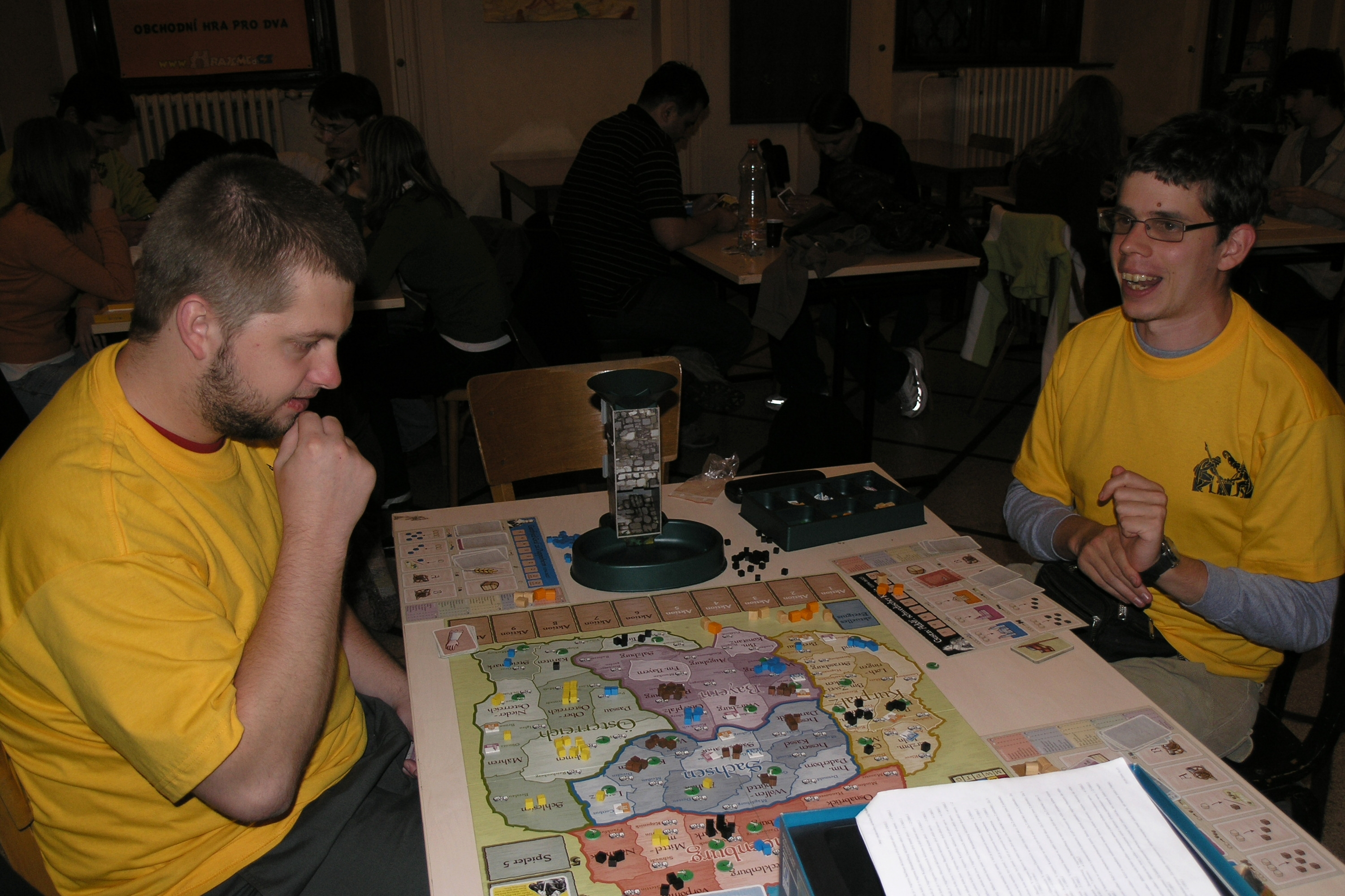 Herní festival Deskohraní 2008 - Wallenstein